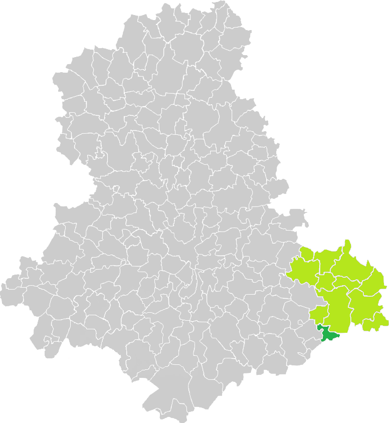 Carte de situation de la commune de Domps (en vert foncé) dans le votre Canton (en vert clair) sur une carte des communes de la Haute-Vienne